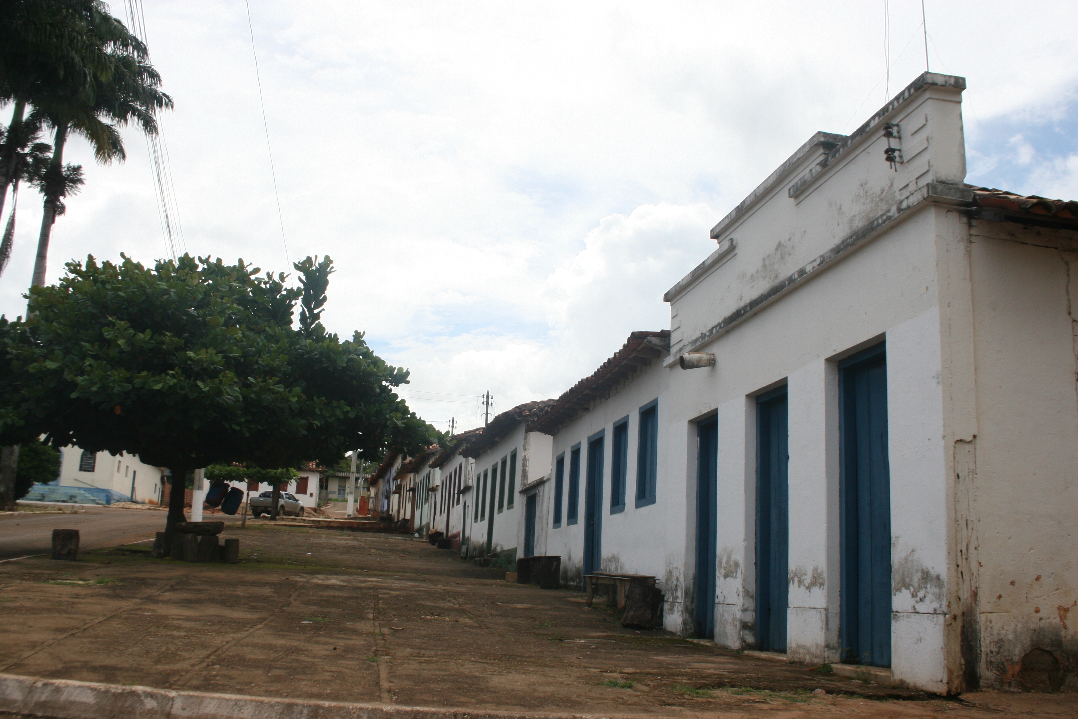 Praça principal da Cidade de Lagolândia no estado de Goiás - Brasil